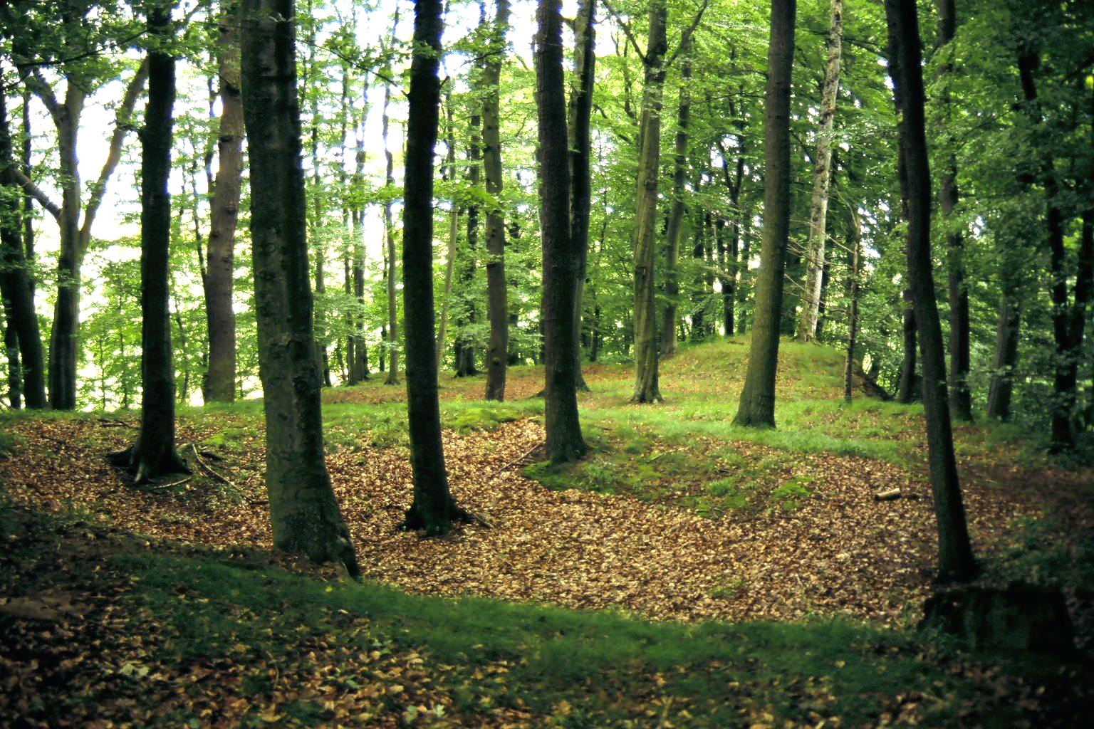 Nördlicher Teil (Hauptburg) der Burgruine Bodenhausen bei Ballenhausen, Gemeinde Friedland, Niedersachsen. Blick vom Ruinenhügel des Bergfrieds nach Norden. Bodenhausen war Stammsitz der Familie von Bodenhausen, 1396 in einer Fehde durch die Stadt Göttingen zerstört, mehrfache Aufbauversuche und Wiederzerstörung. Scan vom Dia